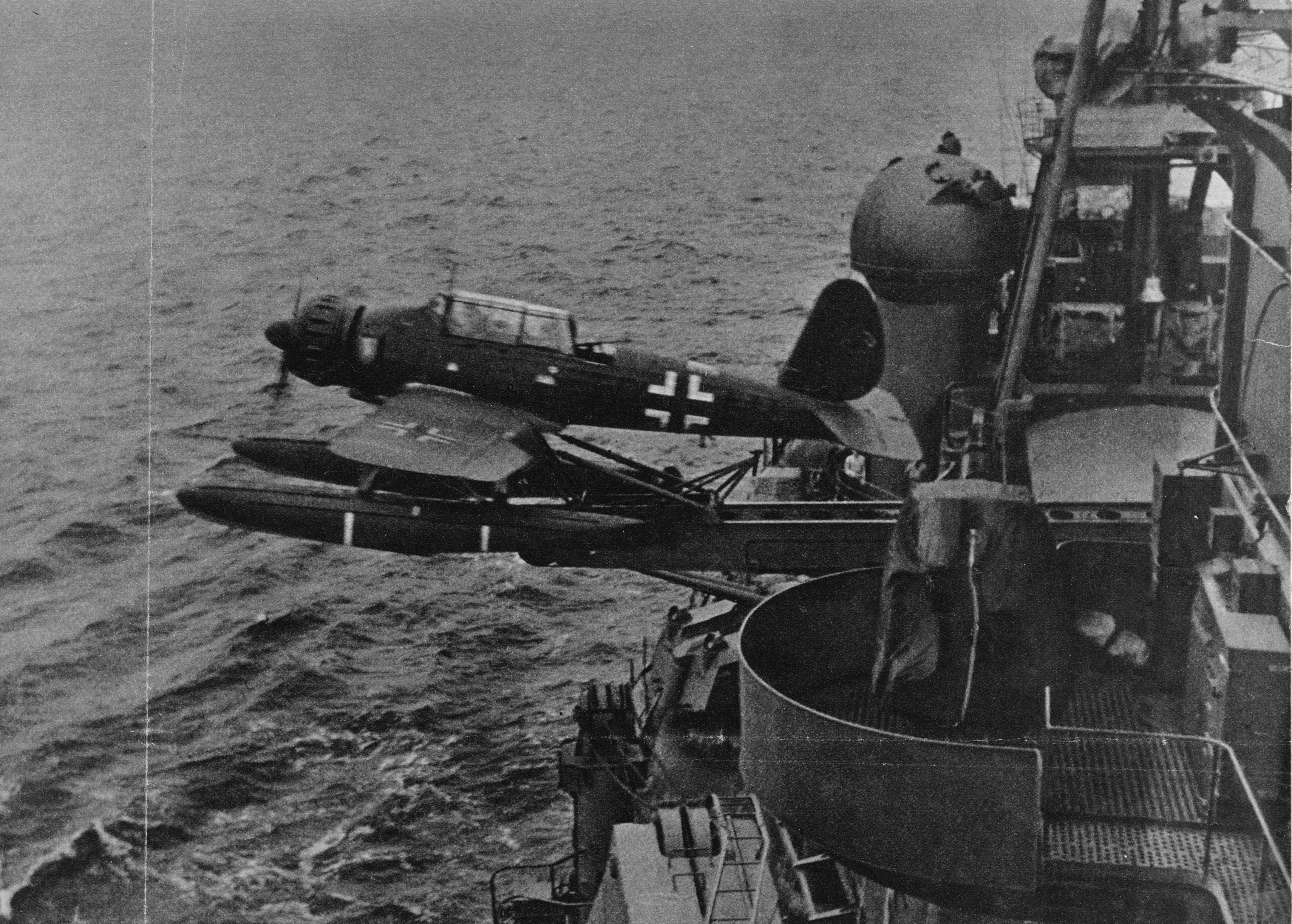 Hidroavión del crucero alemán Admiral Hipper (1942)